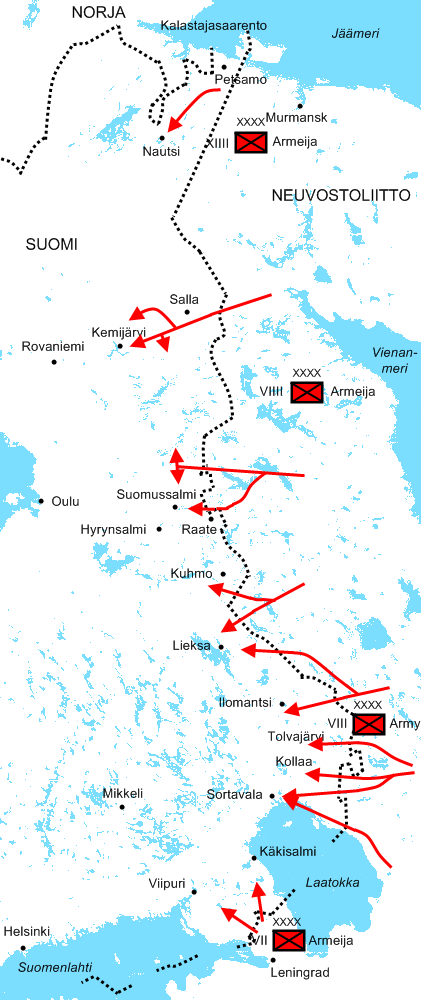 Talvisodan puna-armeijan hyökkäykset ja etenemiset 30. marraskuu - 22. joulukuuta 1939.